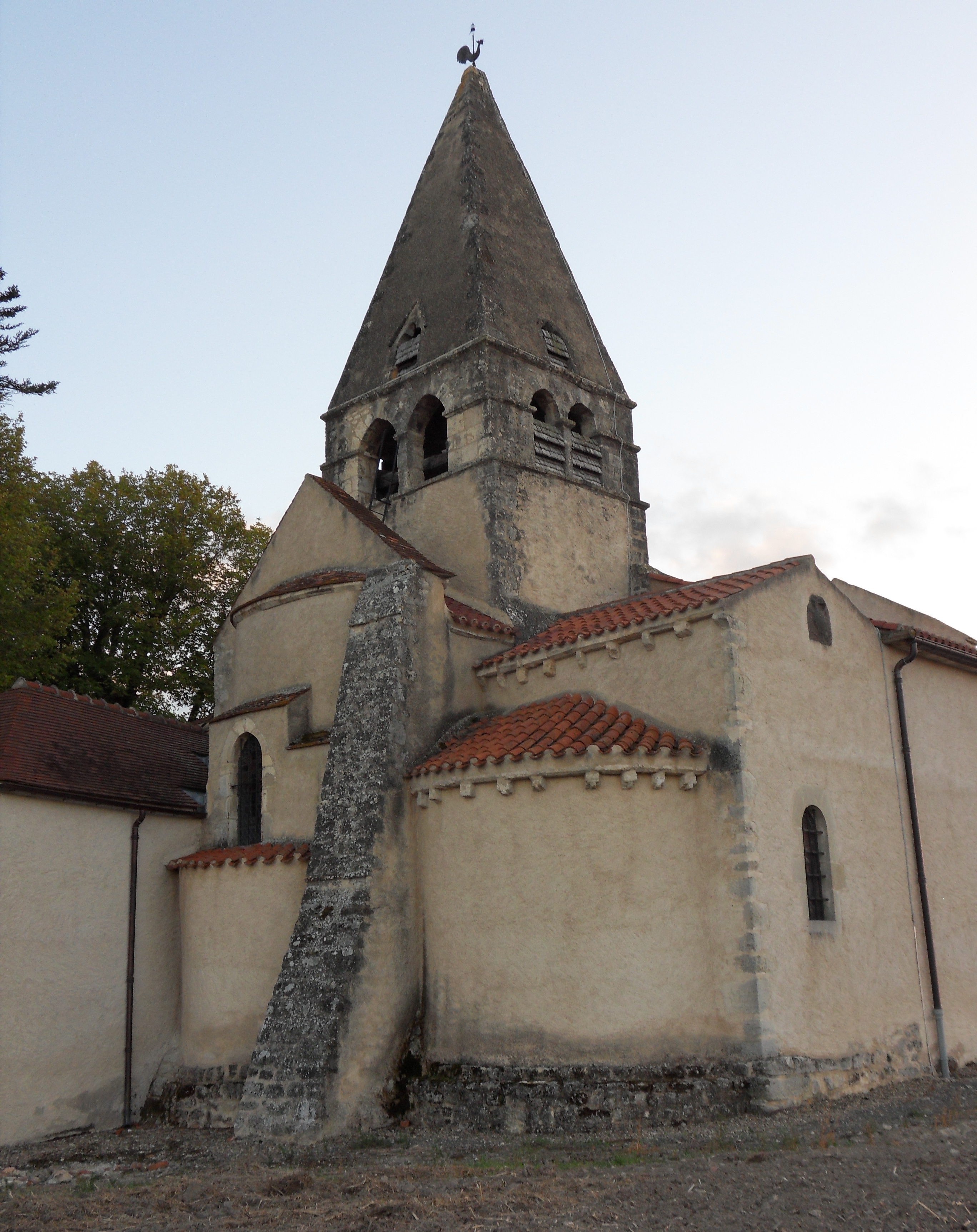 Église Saint-Aignan, (Inscrit, 1970) .